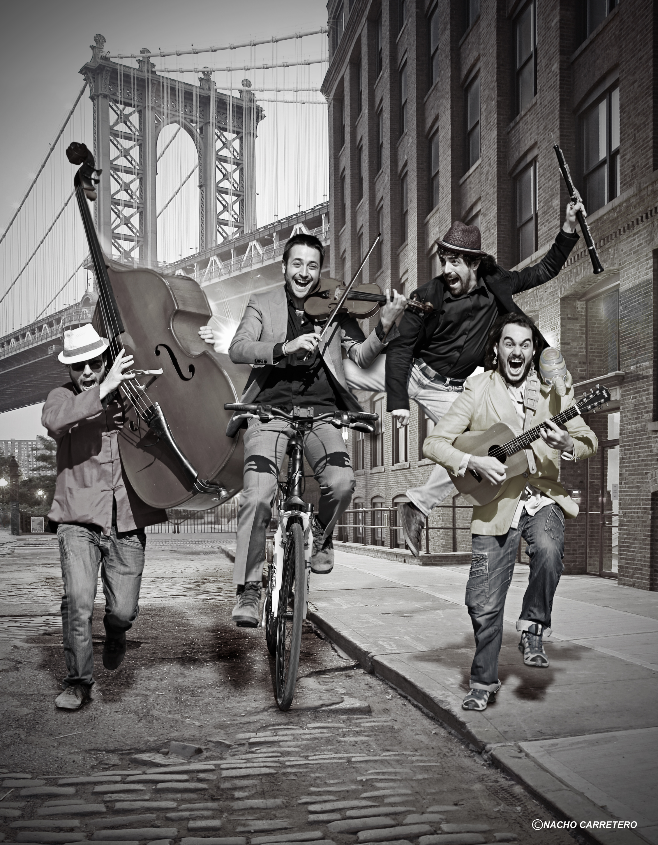 Muyayos de Raiz